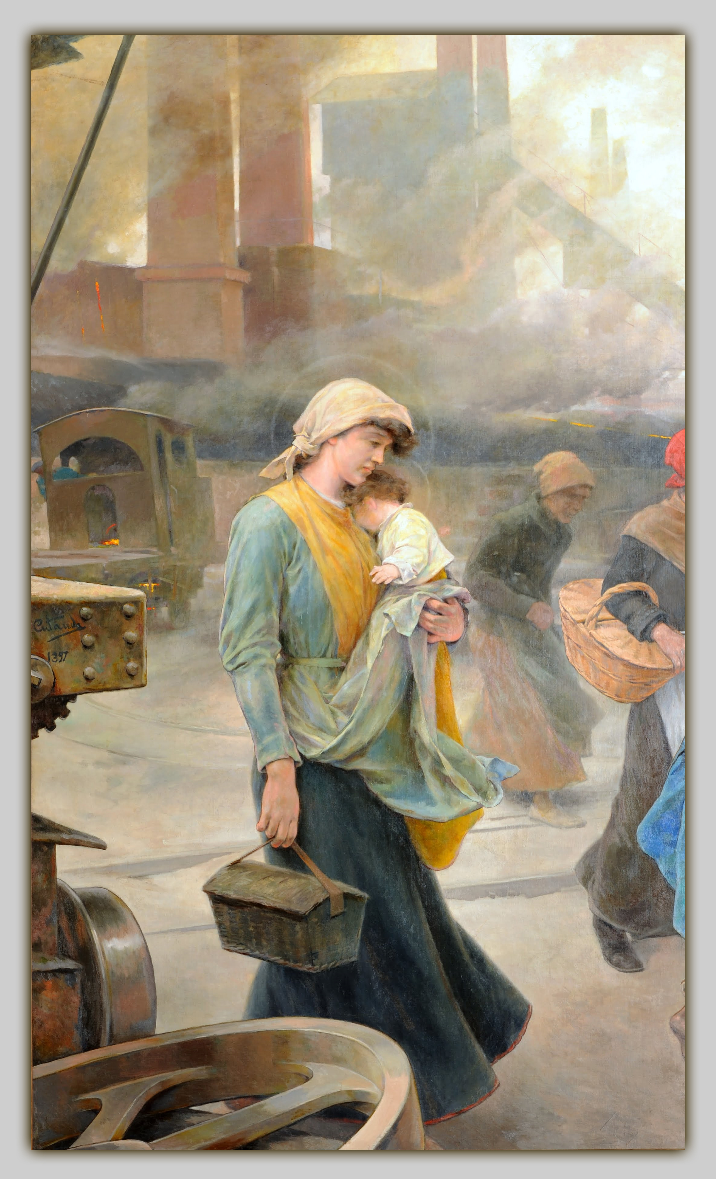 La obra representa a la Virgen María llevando en brazos a su hijo Jesucristo y caracterizada, al igual que los personajes que aparecen en la obra, como una obrera de finales del siglo XIX.